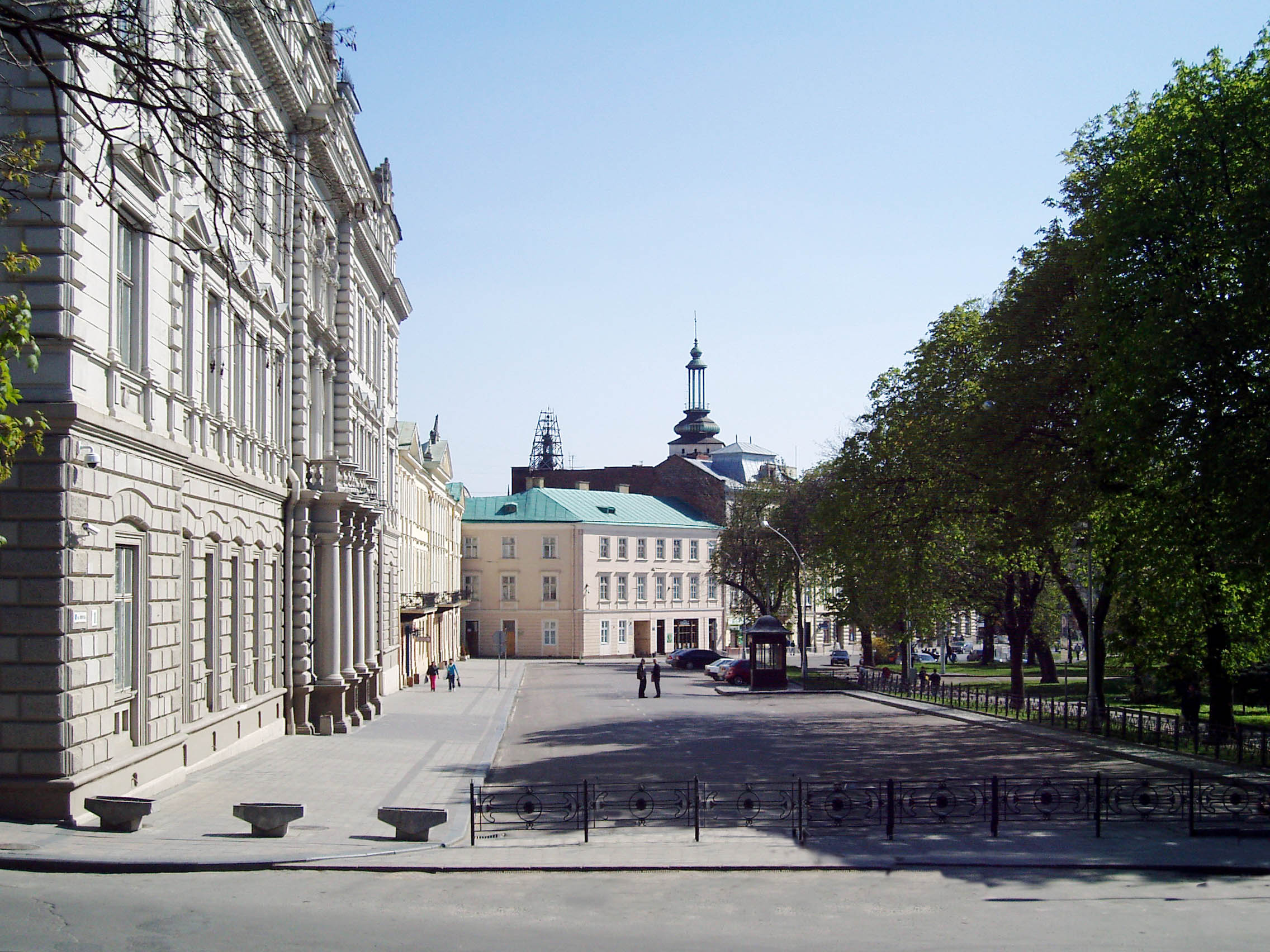 Вулиця Винниченка у Львові